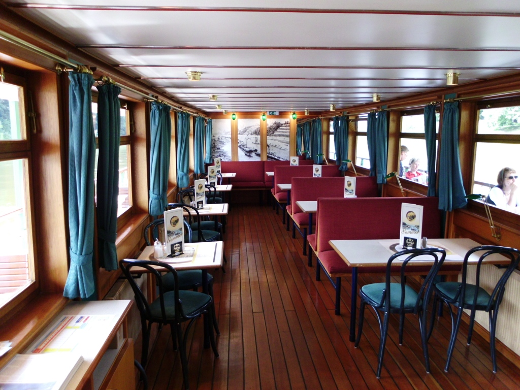 Hintere Salon des Raddampfers Pillnitz